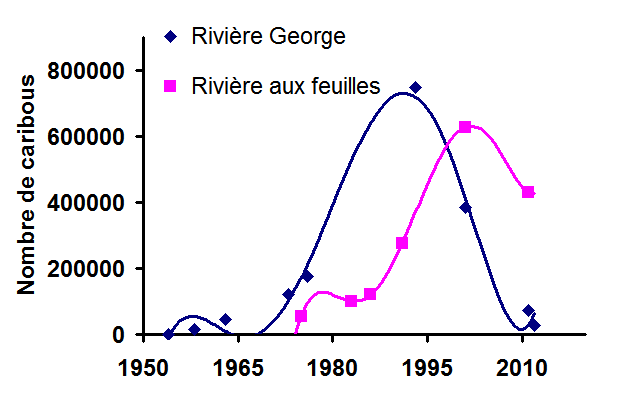 Inventaire TRG TRAF Reh